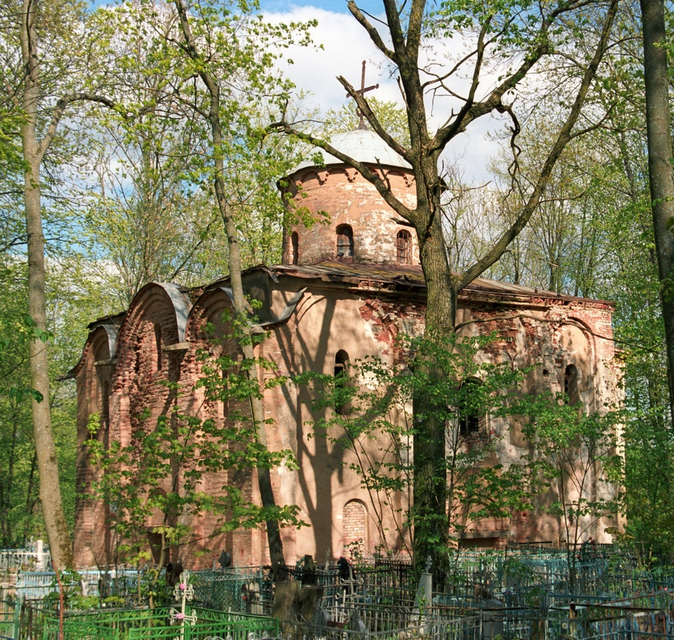 Храм Петра и Павла на Синичьей горе. Великий Новгород